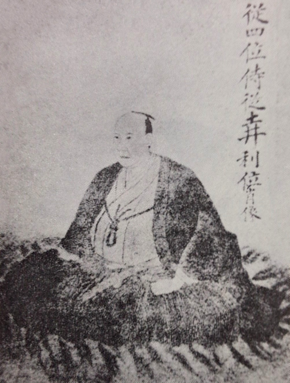 土井利位の肖像。